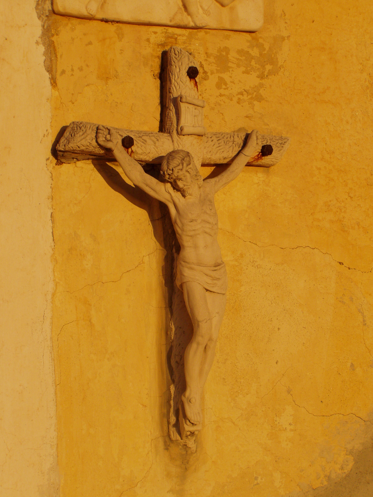 Crocifisso posto nell' Oratorio di Pieve Ligure